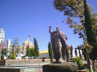 esta foto es una escultura de como posiblemente pudo ser el Tlatoani y guerrero de esta comarcas, y la tome con un amigo en la localidad de Atlihuetzian Tlaxcala en esta foto se puede apreciar de frente como la escultura elaborada de piedra y descansa sobre un montículo material de la región, sirviendo sobre la fuente circular en la parte baja; hermosa escultura, finamente labrada y detallada.